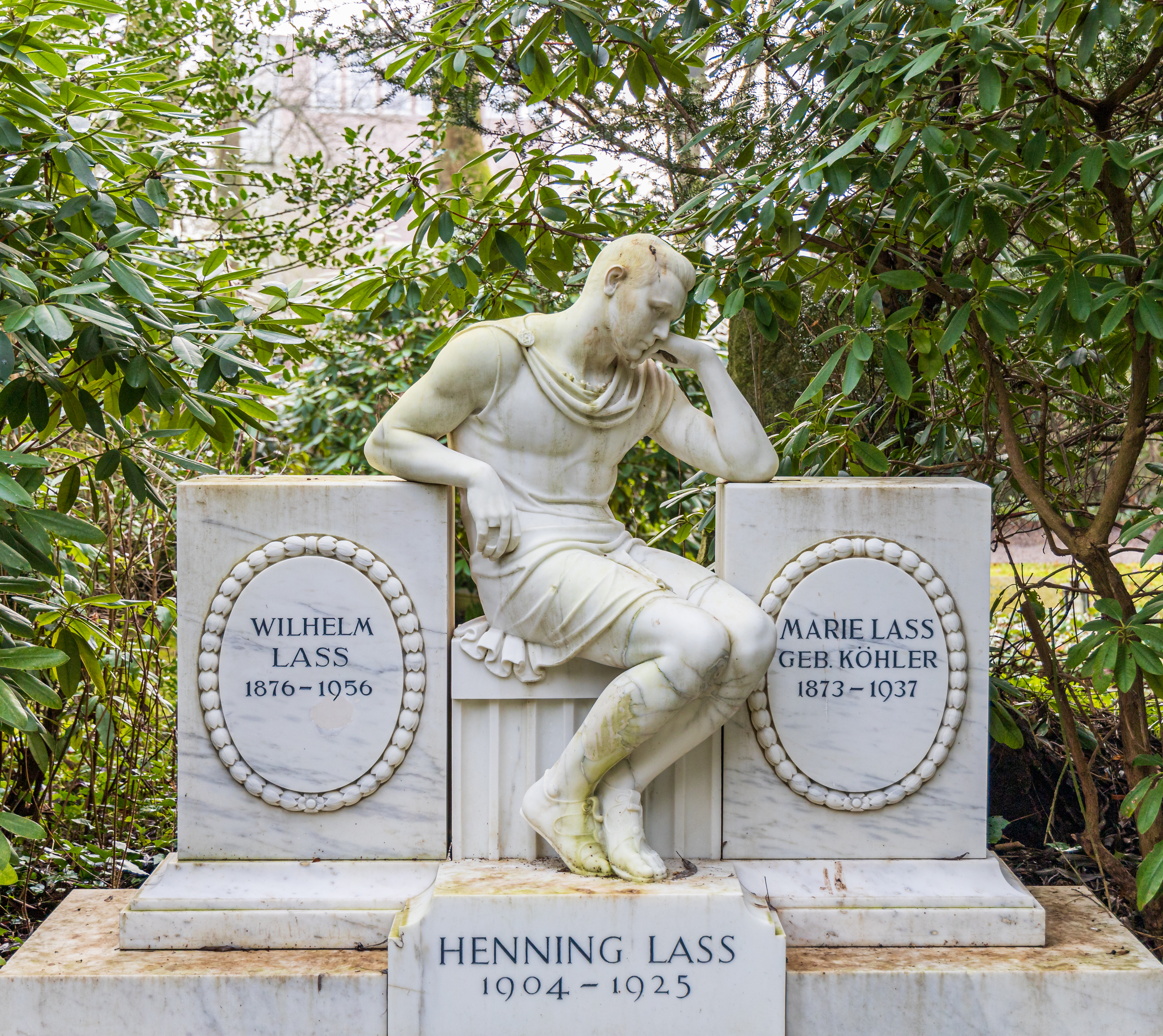 Das Grab von Henning Lass auf dem Südfriedhof (Kiel). Bildhauer des Denkmals aus weißem Laaser Marmor aus Südtirol war Edvard Eriksen. Es ist das einzige Werk des Dänen auf deutschem Boden.